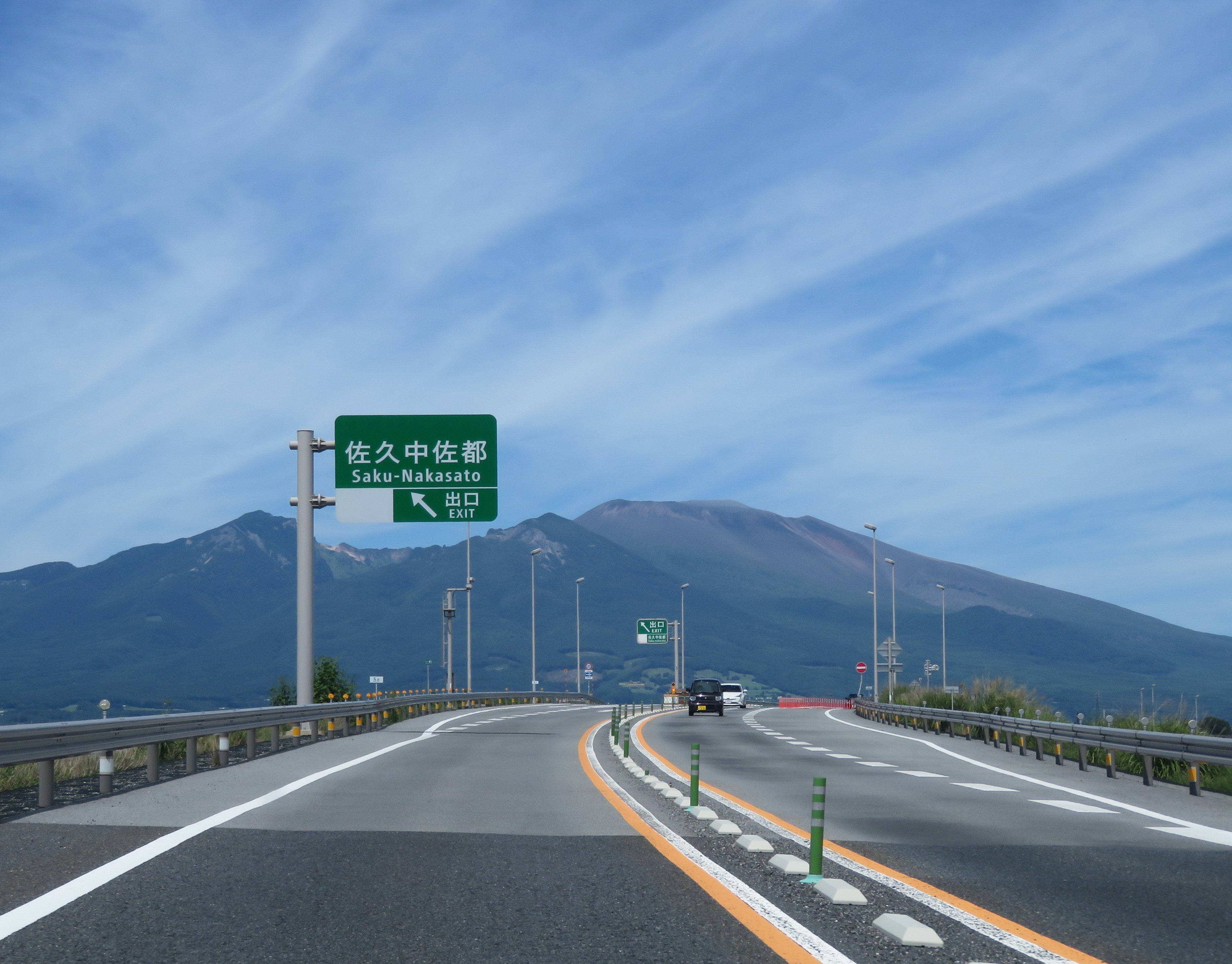 中部横断自動車道佐久中佐都インターチェンジ出口付近（佐久南IC方面側を撮影） Canon PowerShot SX720 HS